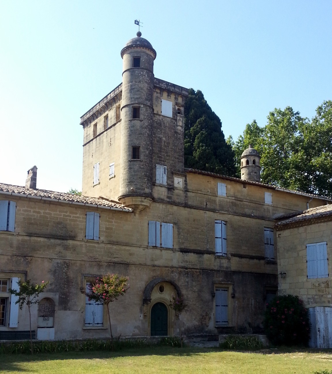 Château de Teillan à Aimargues.